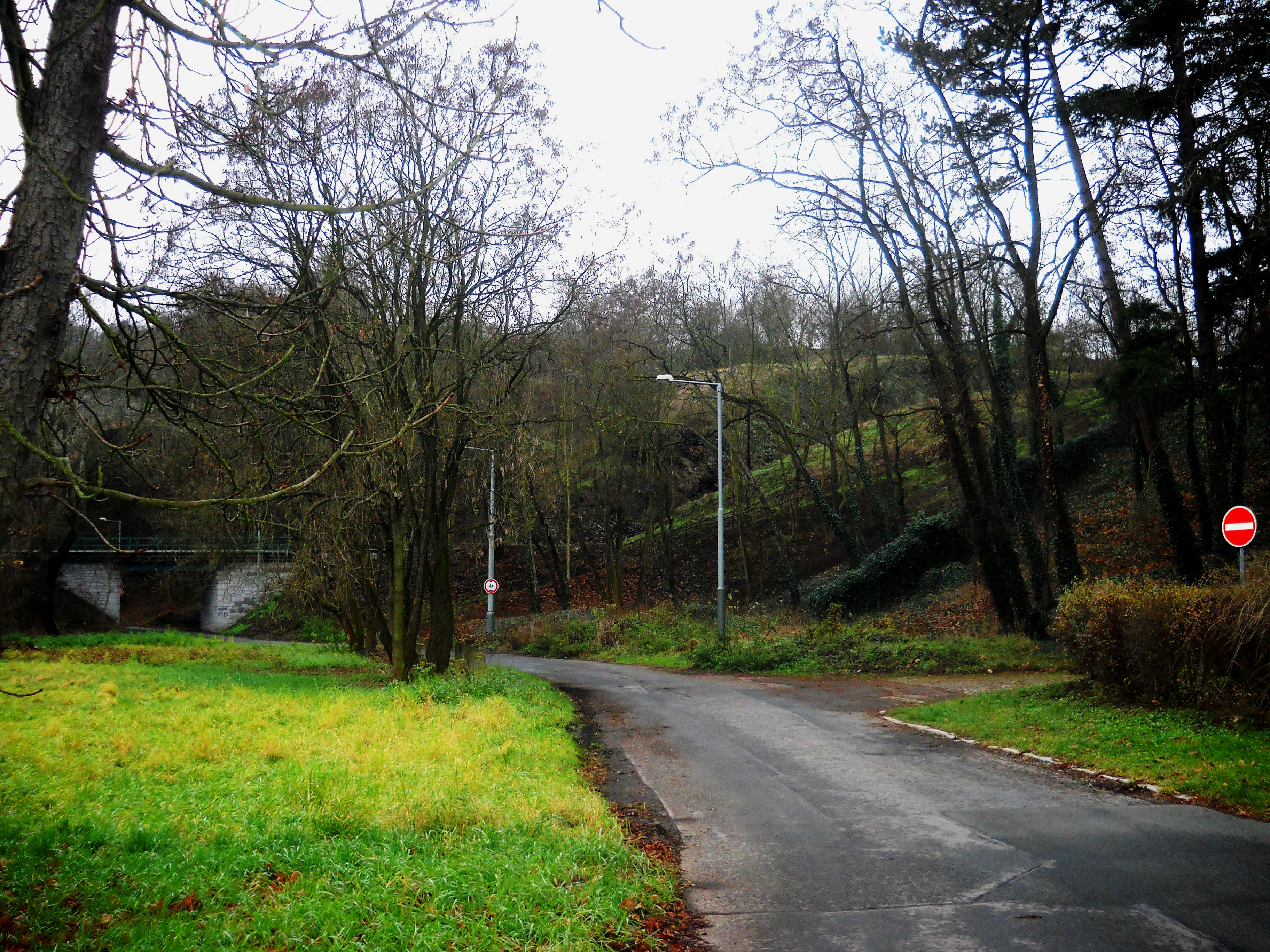 Praha-Hlubočepy. Cesta k přírodní památce Železniční zářez od zastávky autobusu 120 Michnovka.